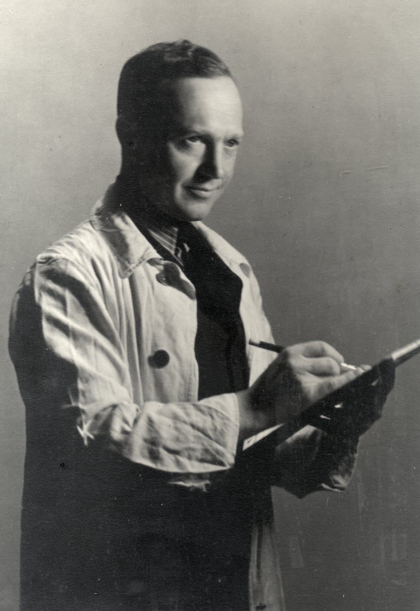 Portrait Willy Reetz, Maler, Deutschland, 1892-1963.